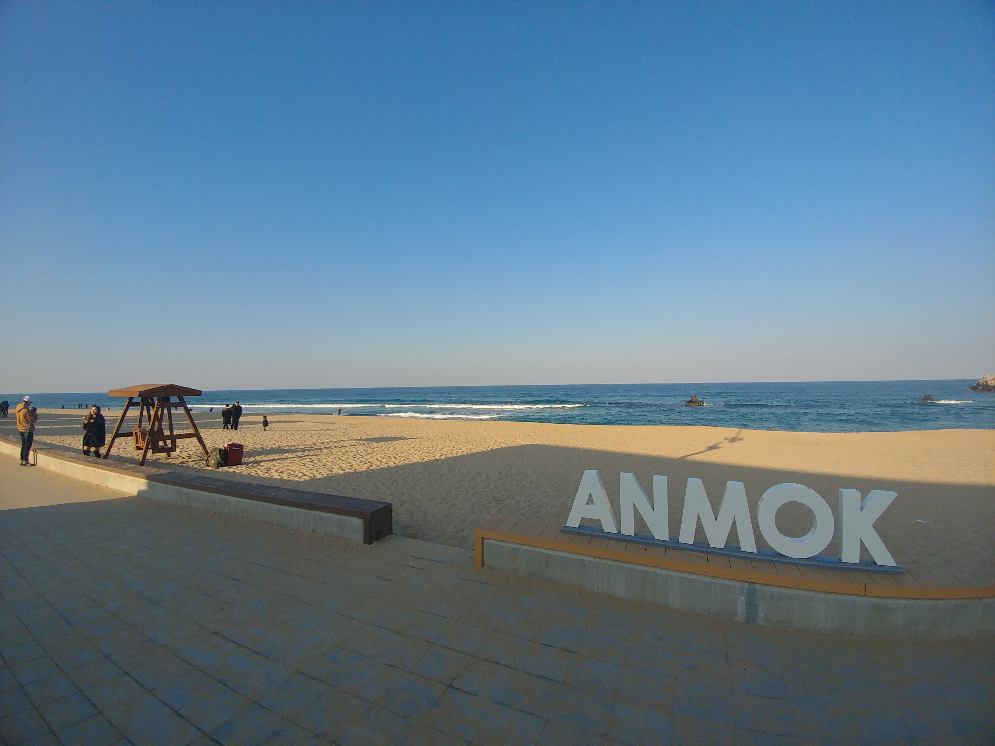 안목해변가